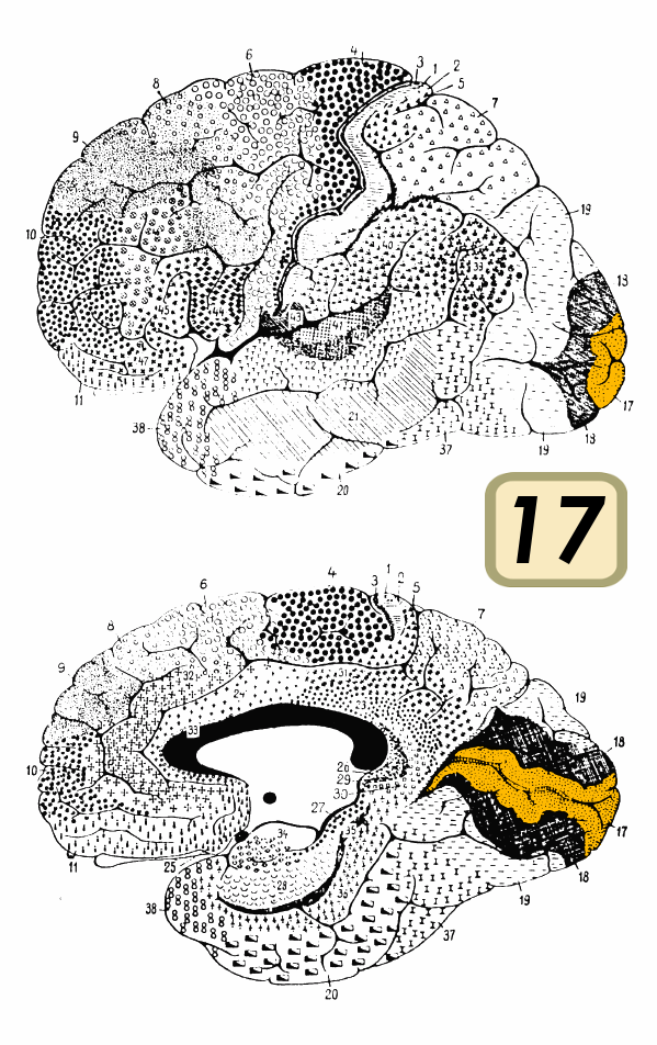 Brodmann area 17.